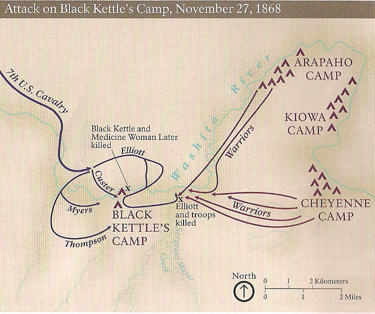 Karte des Angriffs auf das Dorf der Cheyenne am Washita am 27. Nov 1868